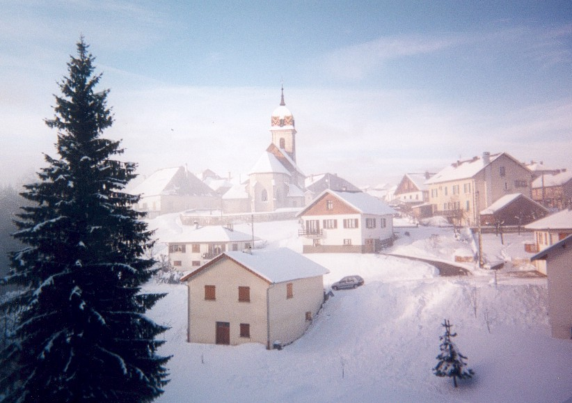 Rochejean (Doubs) sous la neige